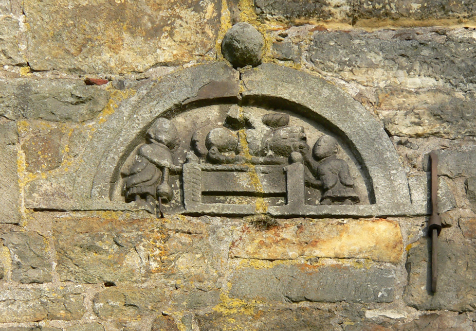 Tympanon Kirche Petzen